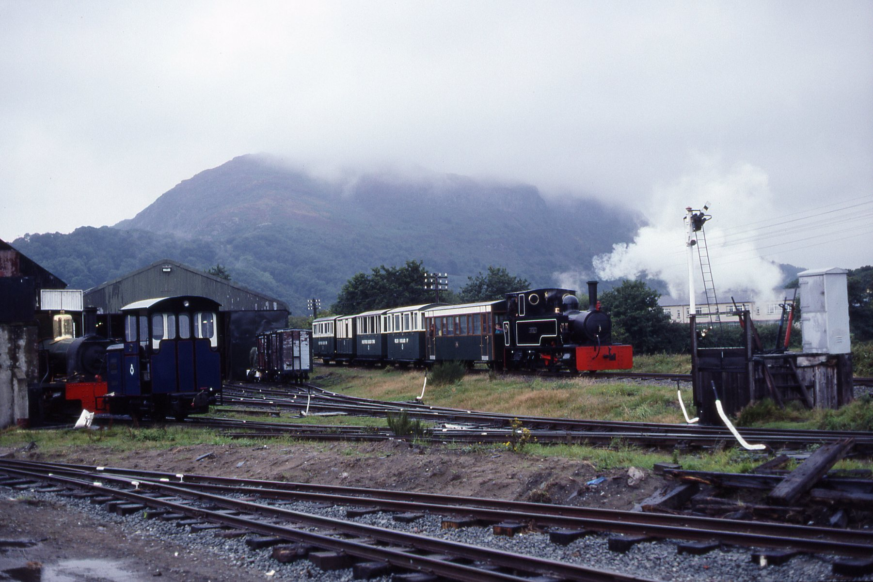 Peckett 2024 'Karen', R&H 4wDE 'Glaslyn' & Bagnell 3050 'Gelert' Porthmadog, WHR, N Wales 15.8.1992